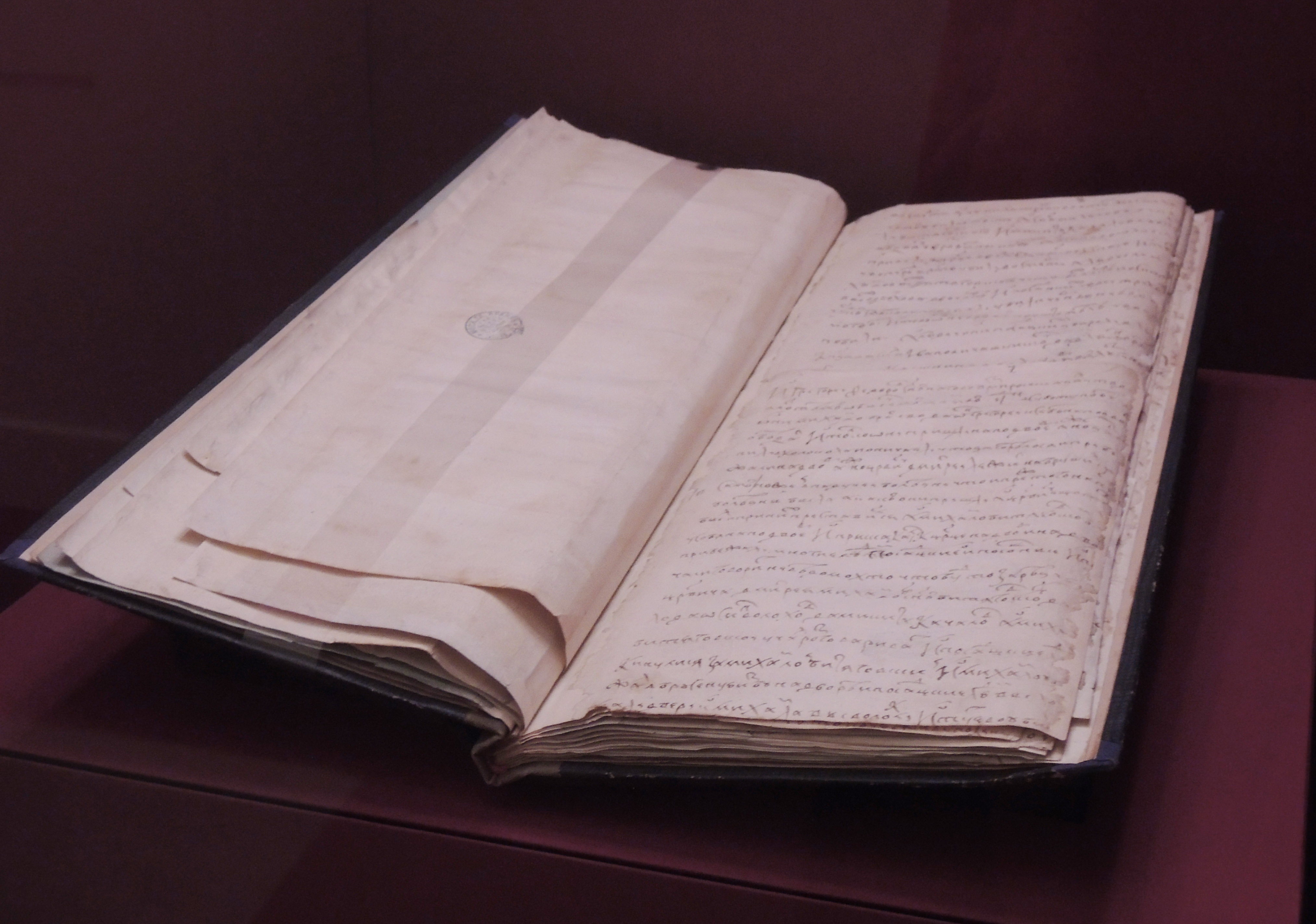 Следственное дело об убийстве царевича Димитрия. 1591 год, переплет не позднее 1798. РГАДА